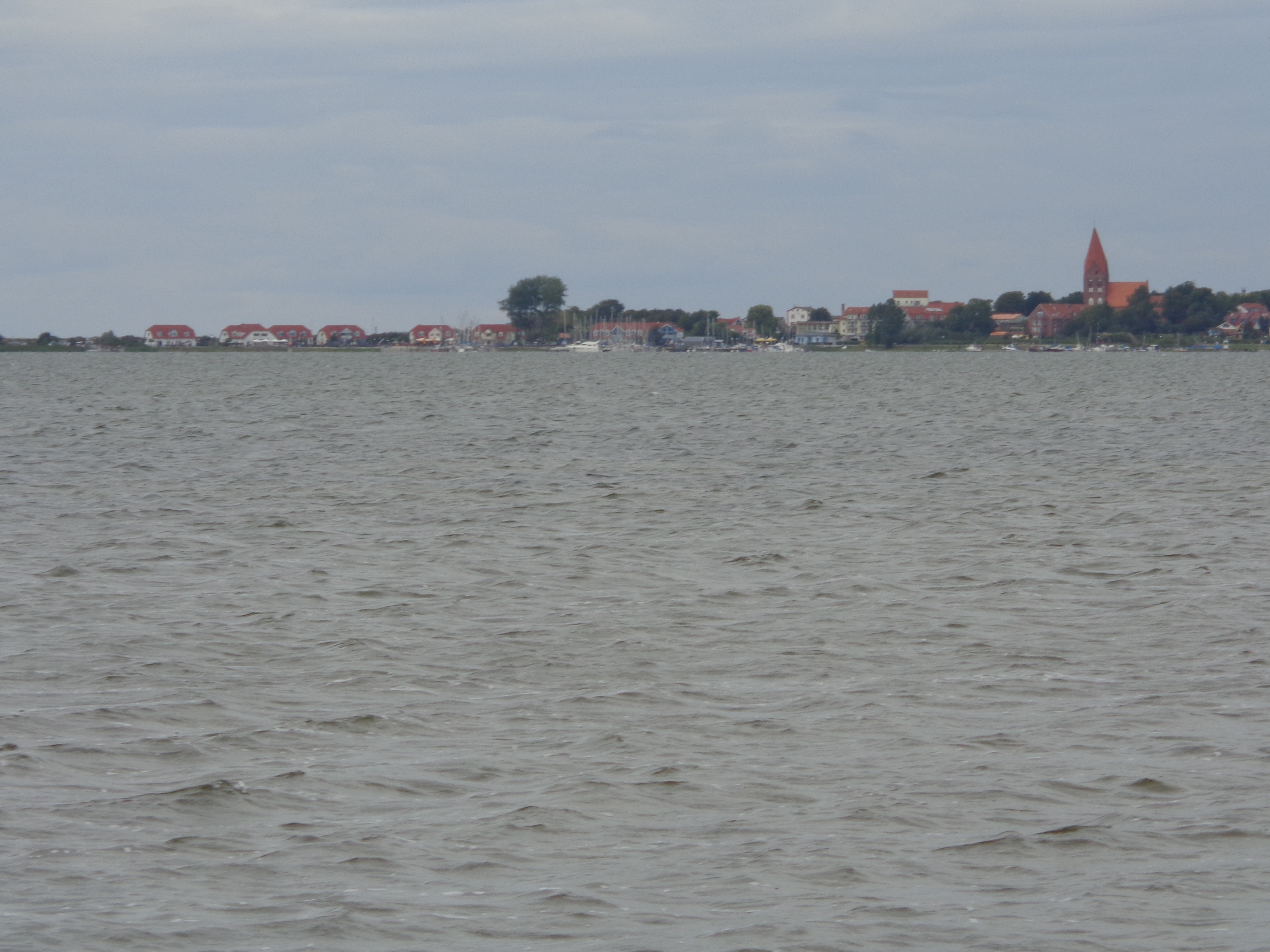 Südlicher Blick auf Rerik über das Salzhaff, links der Damm nach Wustrow (Halbinsel).